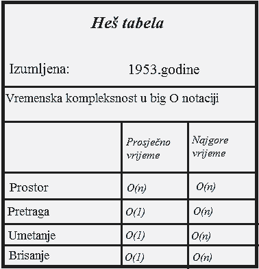 Heš tabela, vremenska kompleksnost u Big O notaciji